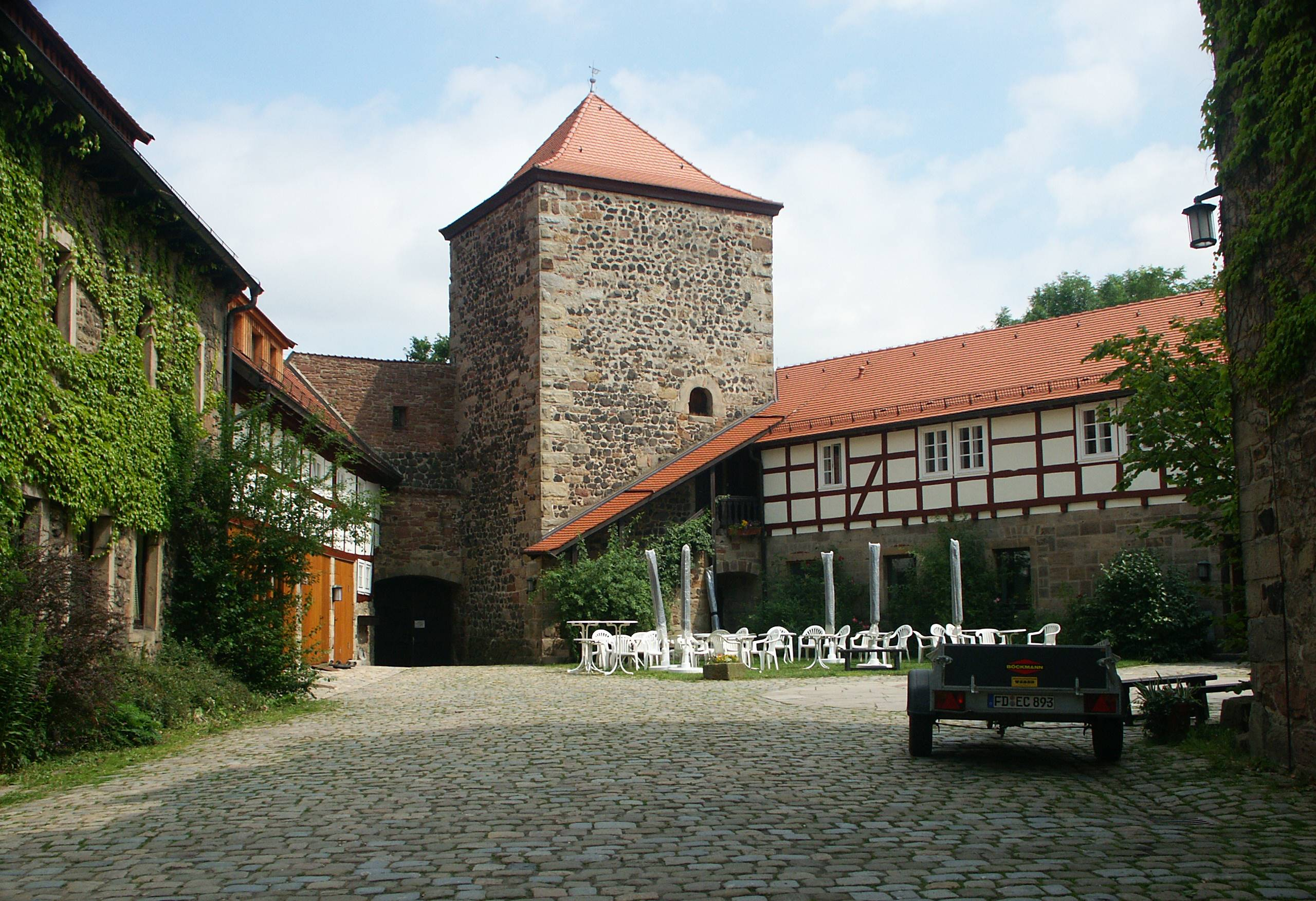 Innenhof der Burg Fürsteneck mit Blick auf den nördlichen Eckturm